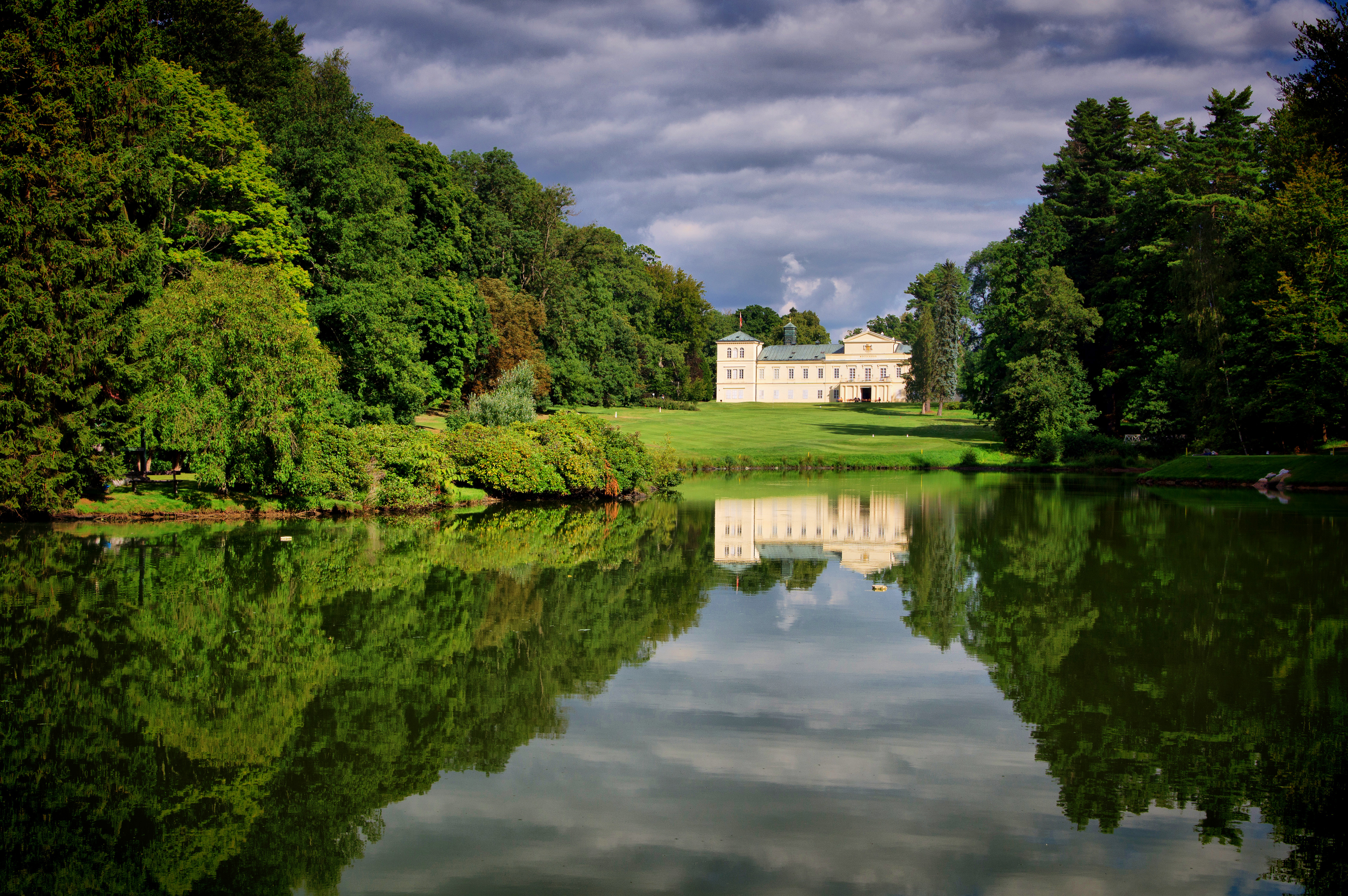 Zámek Kynžvart, Zámek 347, 348, 349, 350, 351, 352, 353, 354, 355, Lázně Kynžvart.